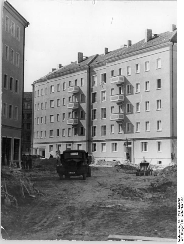 Berlin, Schwedter Straße, Neubauten, Wohnblocks Zentralbild Krueger Krue-Sch. 18.9.1956 Die Gerüste auf der Baustelle Schwedter Strasse sind gefallen In dieser Woche sind die ersten Gerüste auf der Baustelle Schwedter Strasse im Berliner Stadtbezirk Prenzlauer-berg gefallen. Damit steht ein weiteres Wohnungsbauprojekt kurz vor der Vollendung. UBz: Blick auf die neuen Wohnhäuser in der Schwedter Strasse.